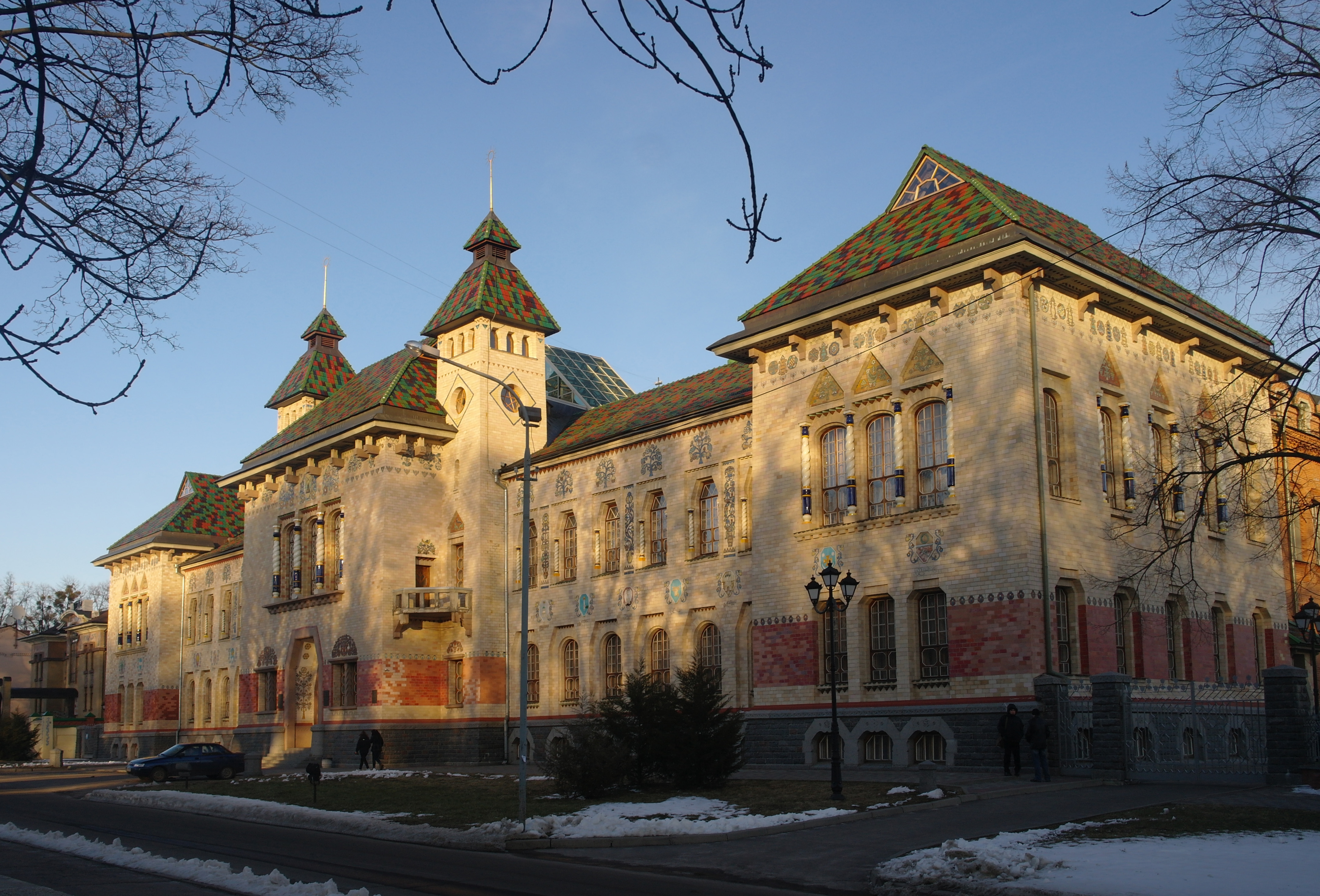 Полтава, Земство